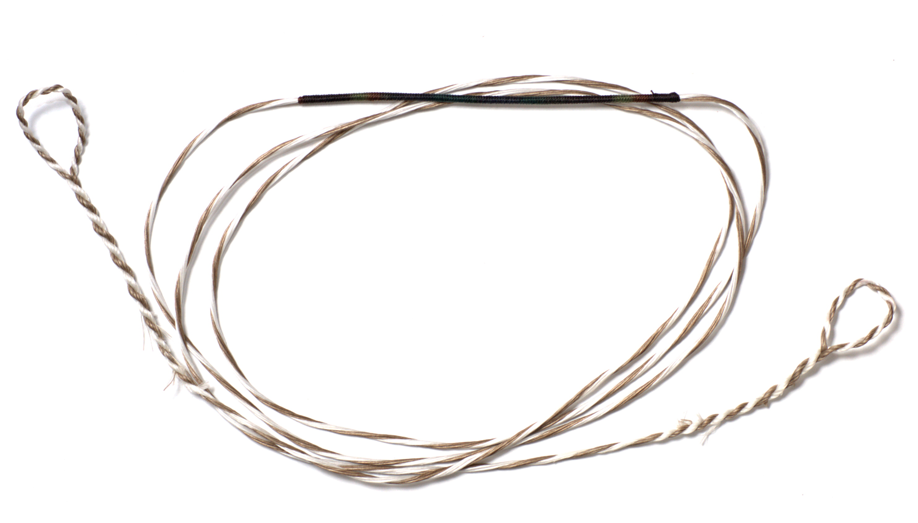 Zweiseitiger Flämischer Spleiss